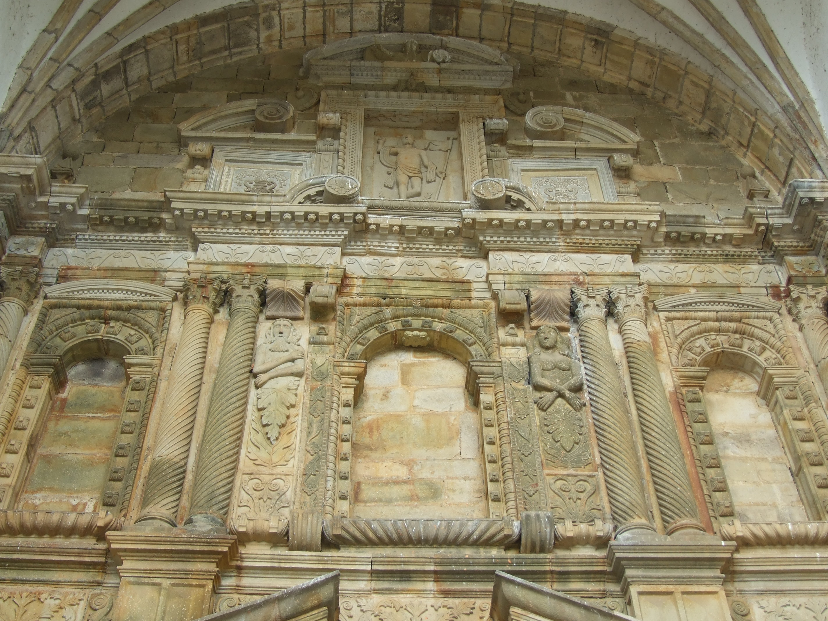 Iglesia de San Vicente de la Maza, Rioseco, Guarnizo, Cantabria